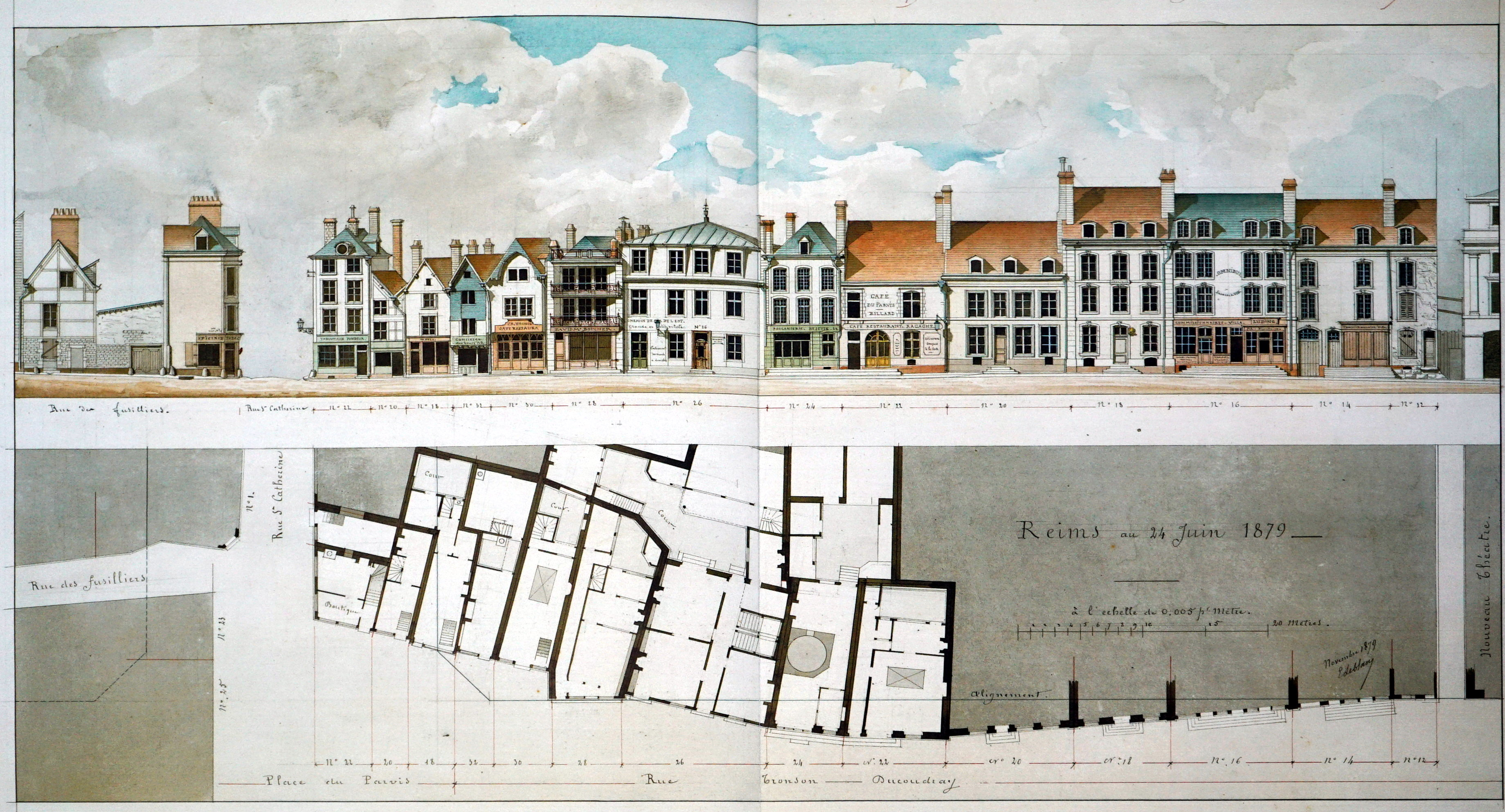 extrait des dessins de Leblan sur l'architecture de la ville de Reims.